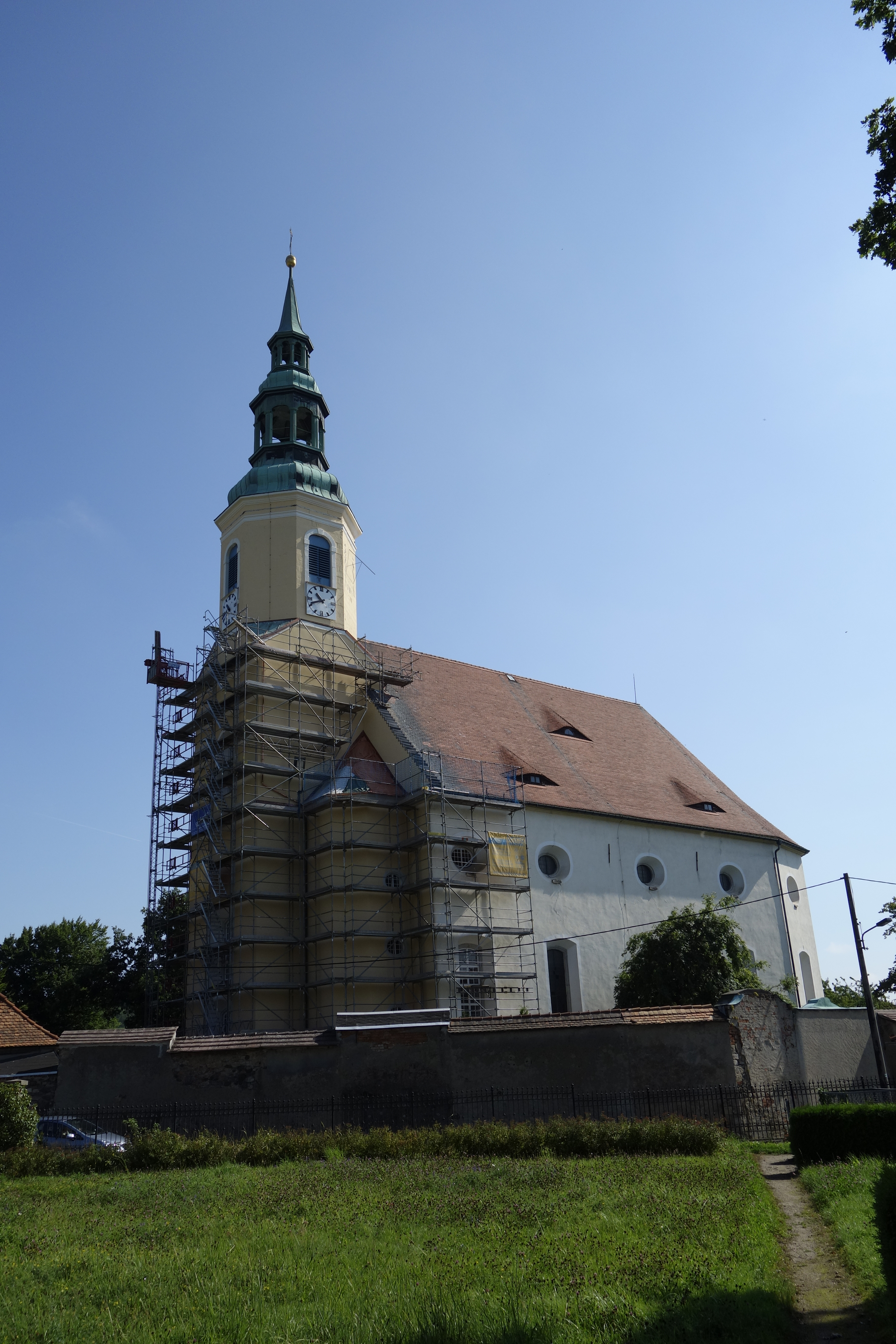 Kirche Eibau August 2017 (1)